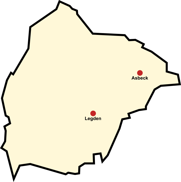 Ortsteile von Legden